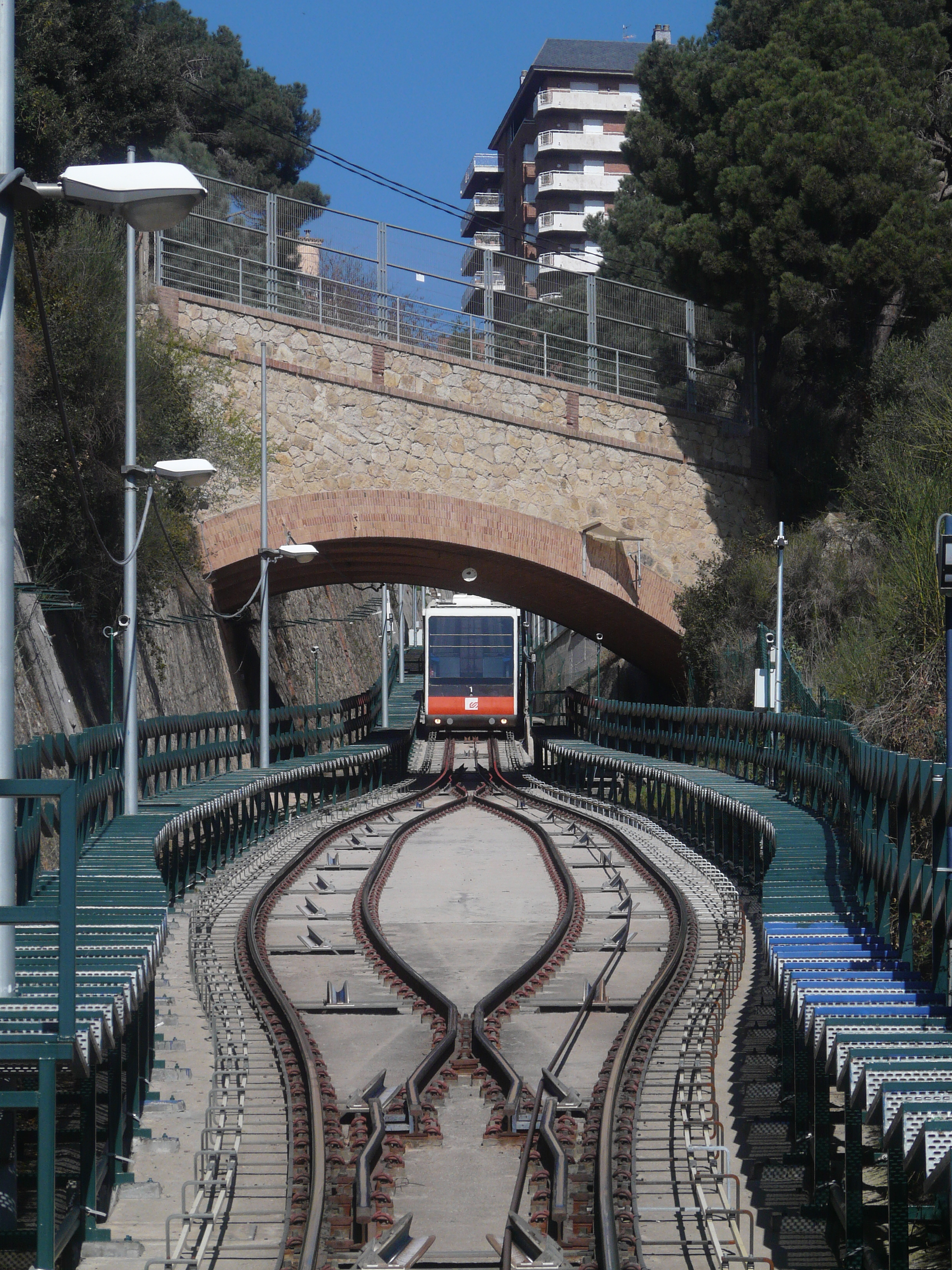 Conjunt del Funicular de Vallvidrera (Barcelona) Object location41° 24′ 51.1″ N, 2° 06′ 20.31″ E